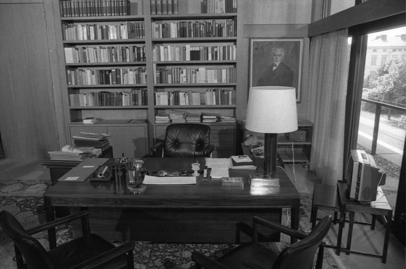 Bundeskanzler Schmidt in seinem Arbeitszimmer im neuen Bundeskanzleramt